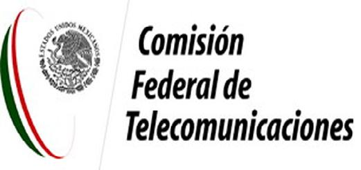 Logotipo oficial de la Comisión Federal de Telecomunicaciones.